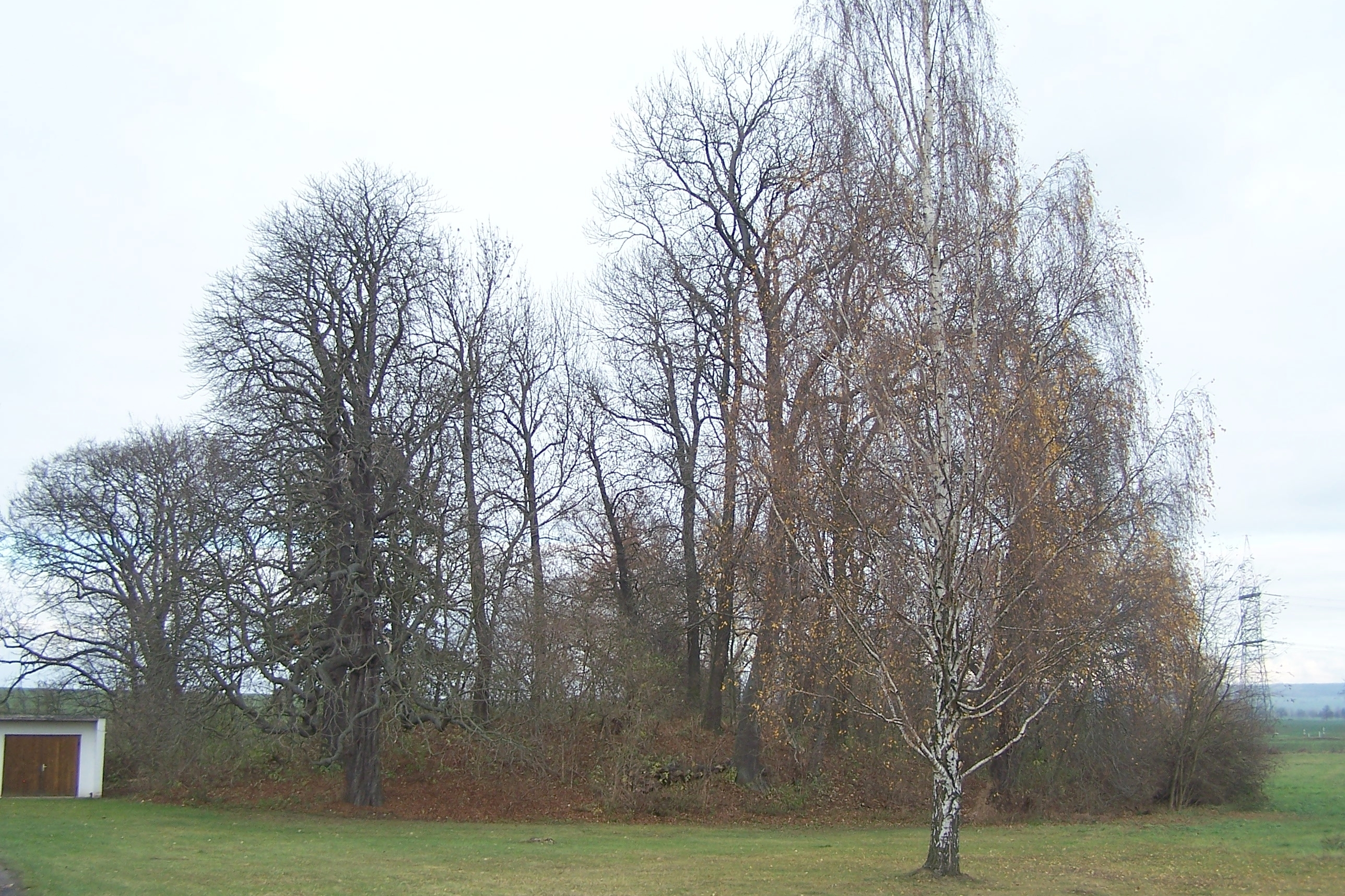 Kindleben